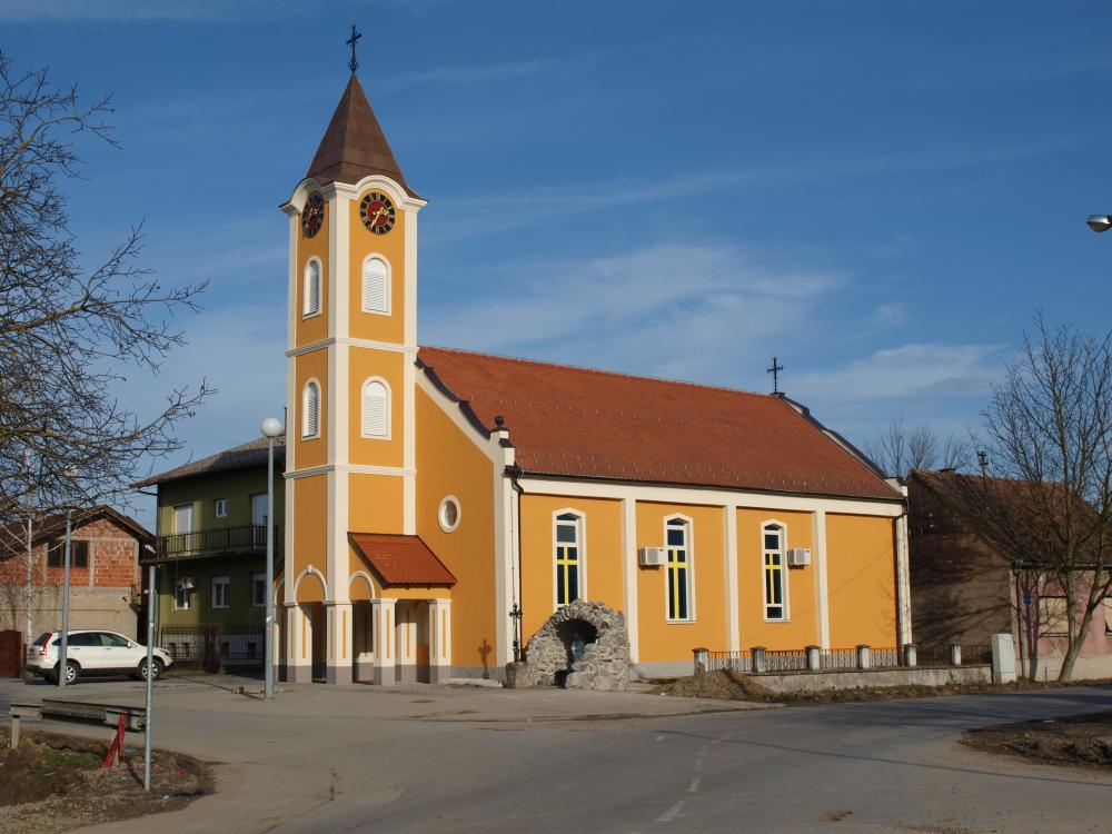 Crkva u selu Ruščica, koje se nalazi u u Brodsko-posavskoj županiji.